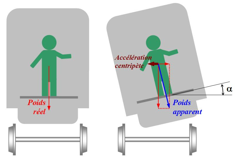 Explication physique de l'utilité du train pendulaire. Schéma personnel réalisé sous word pour l'article force centrifuge